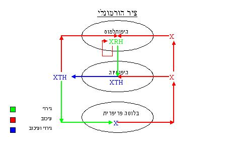 תרשים של ציר הורמונלי פשוט